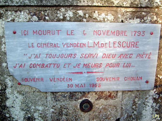 Calvaire Les Besnardières - détail